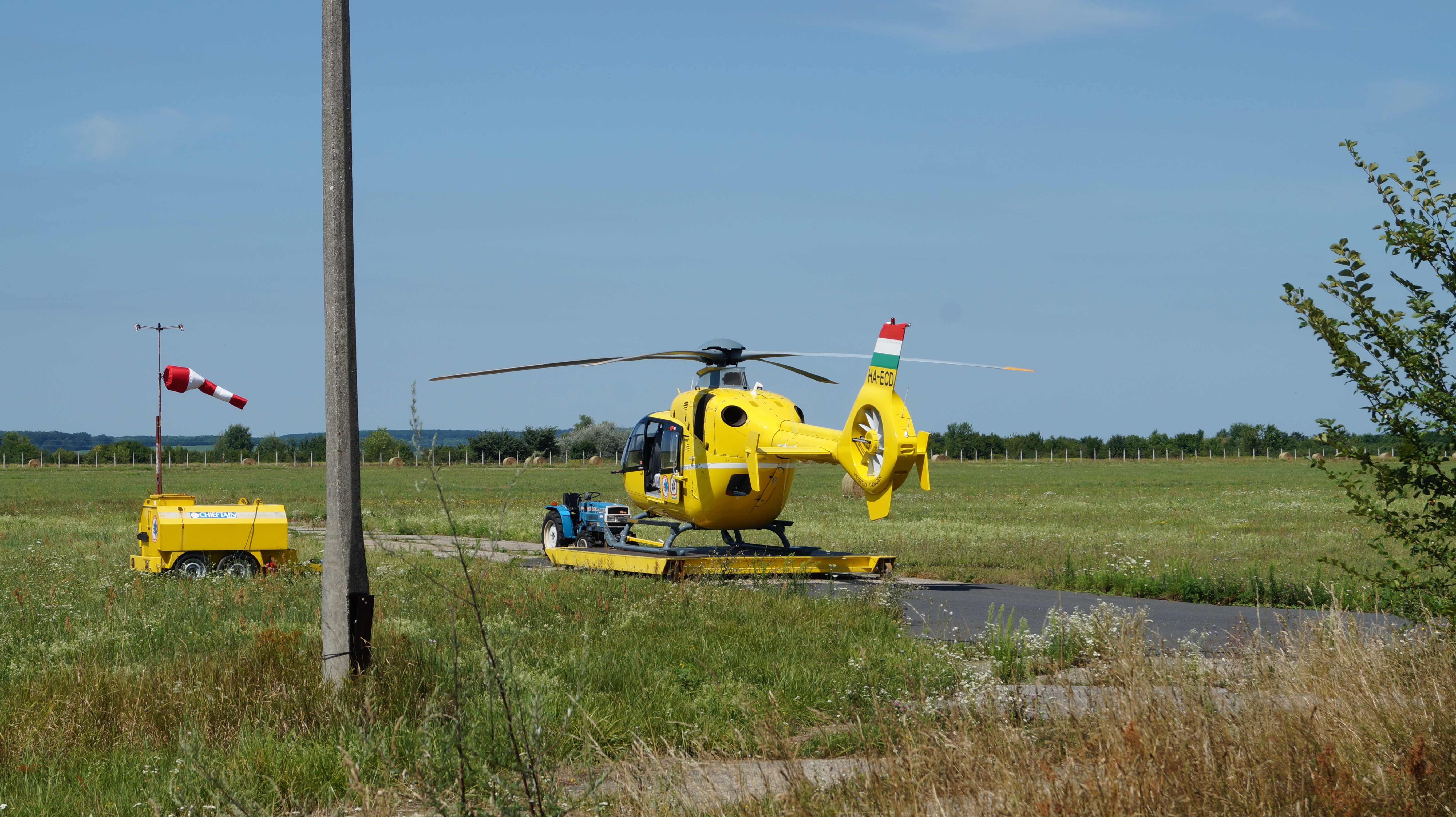 Ein EC135 T2 der ungarischen Luftrettung auf dem Flughafen Sármellék.